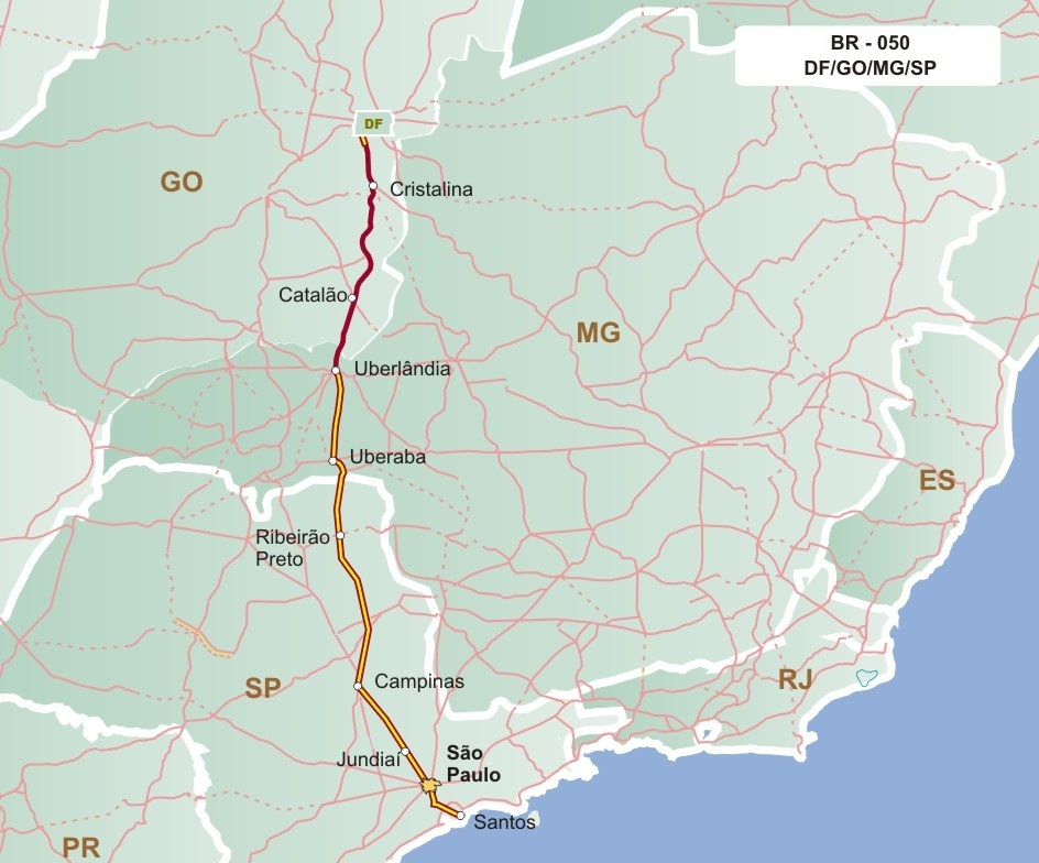 Mapa descritivo da BR-050 em relação as outras rodovias brasileiras.